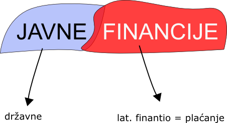 Shema značenja pojma "Javne financije"